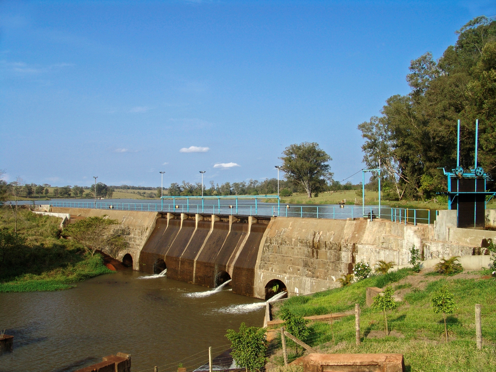 Usina Hidrelétrica do Rio Novo, barragem - Avaré, São Paulo, Brasil